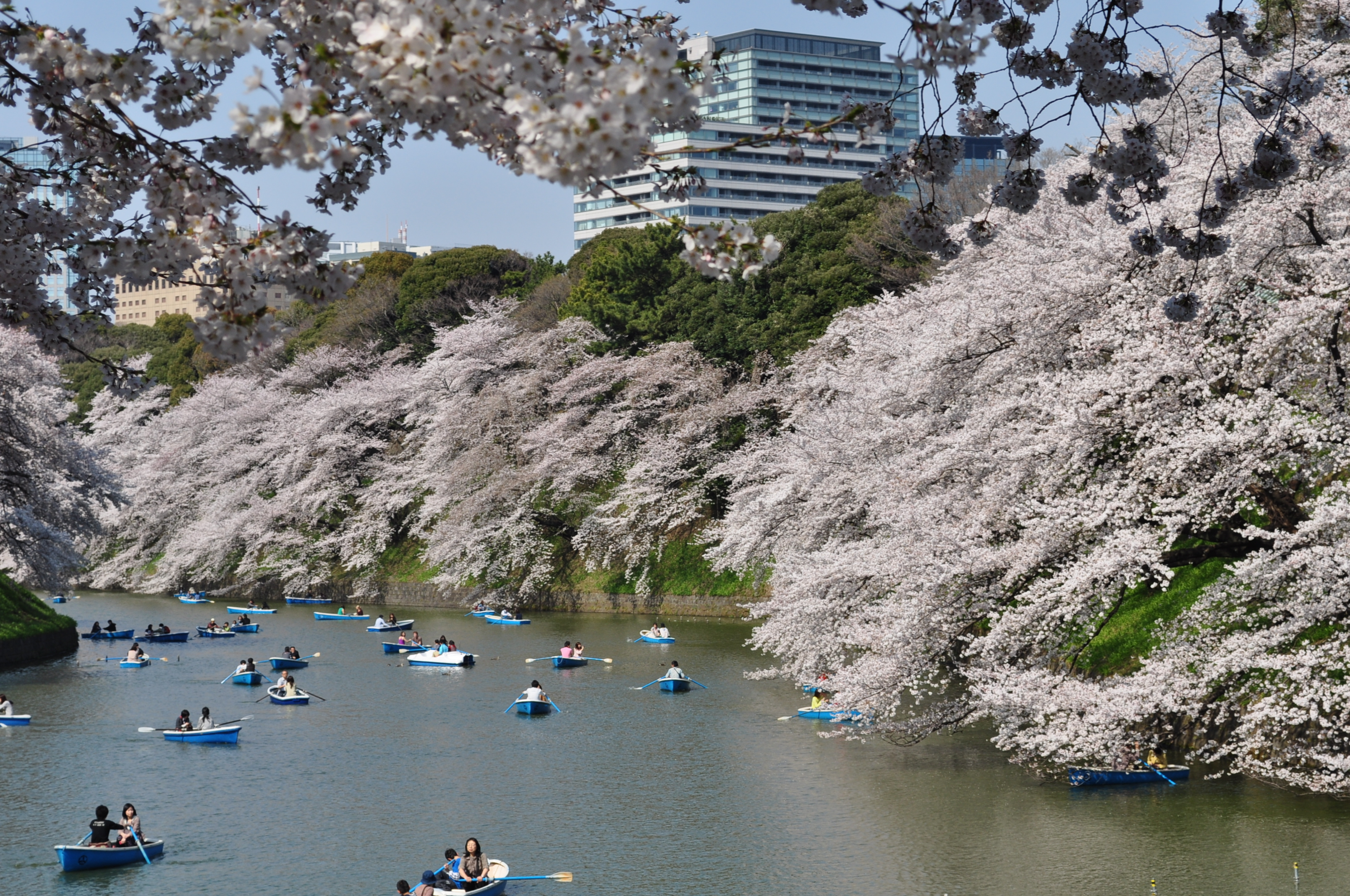 千鳥が淵のお花見